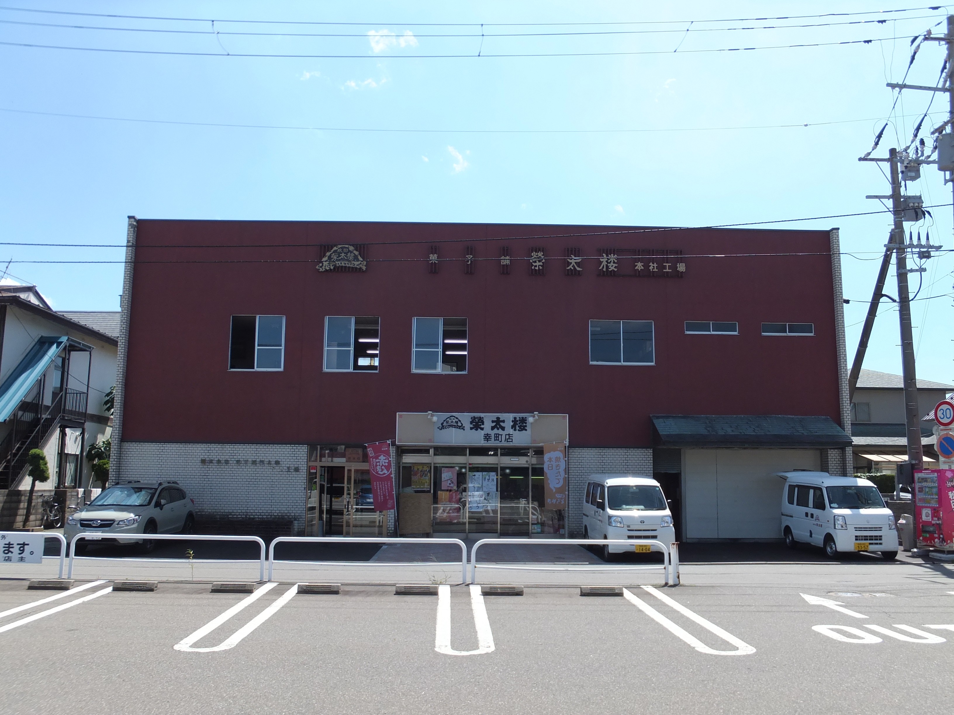 秋田市の菓子舗「榮太楼」本社工場 （秋田市高陽幸町）